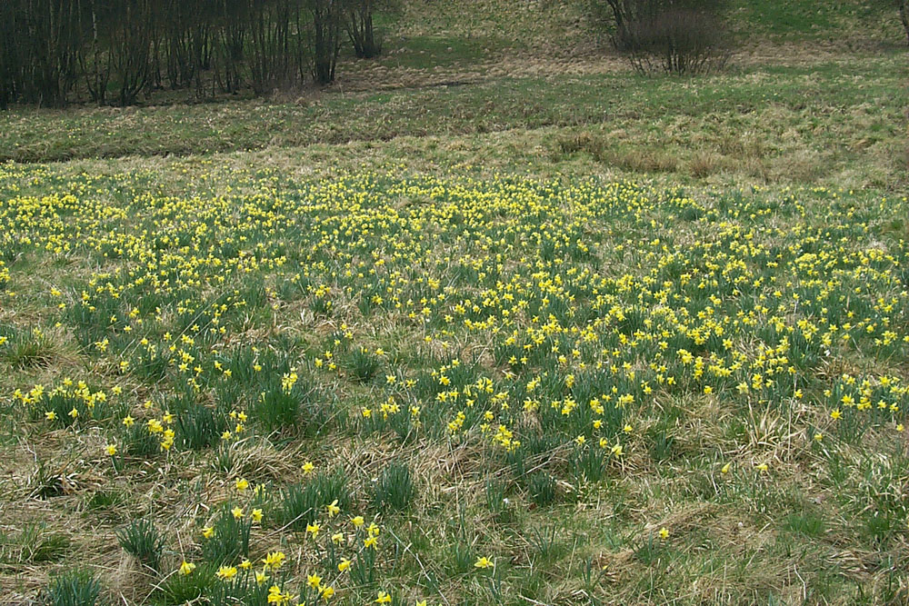 Narzissenbestand im Naturschutzgebiet „Perlenbach-Fuhrtsbachtal-Talsystem“, Anfang Mai